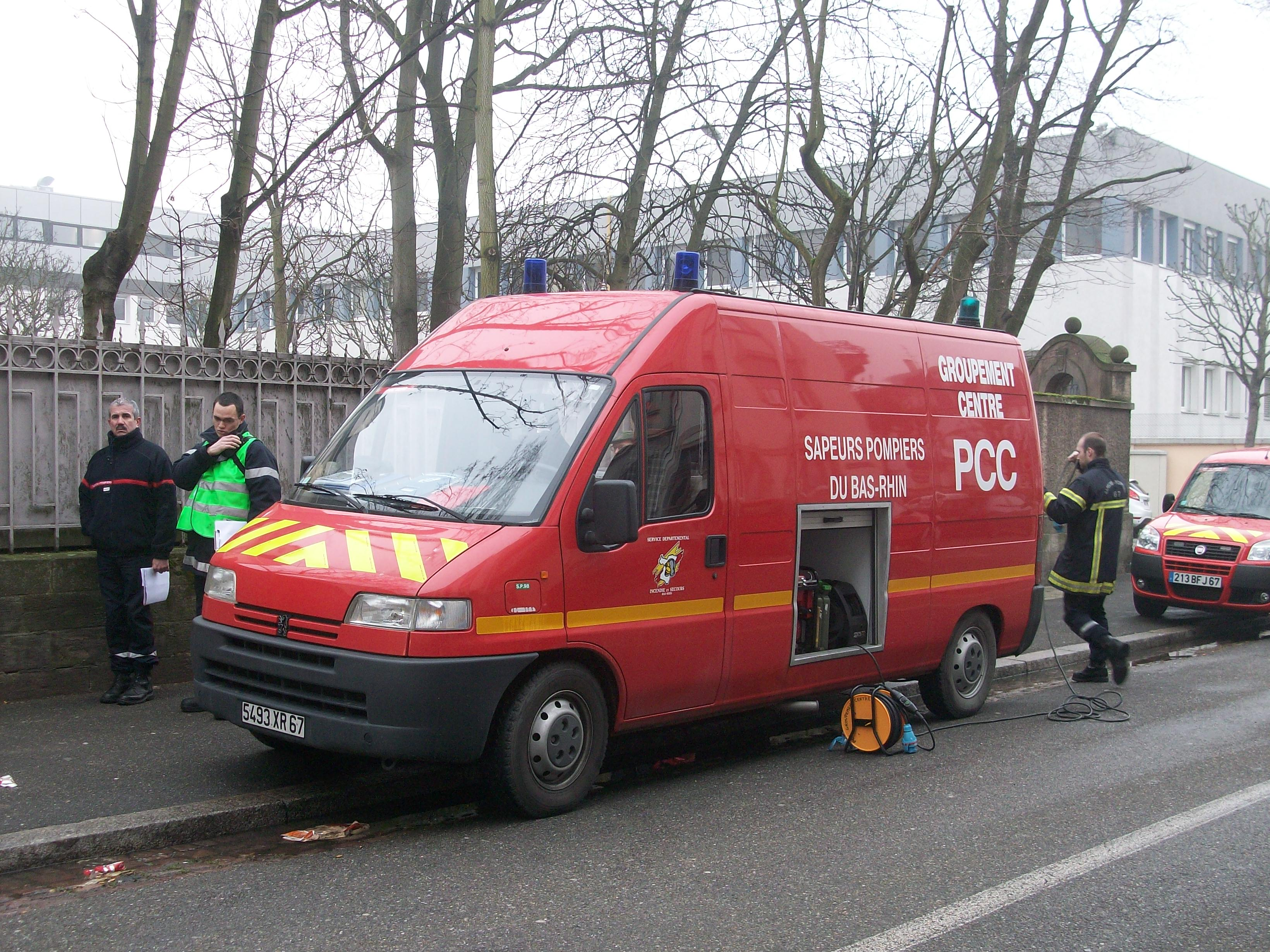 Sapeurs-pompiers en exercice à Strasbourg - février 2011